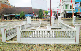 Ini adalah makam Teungku Peukan seorang pahlawan kemerdekaan di halaman Masjid Jami' Blangpidie.